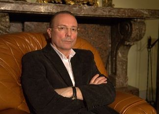 Виктор Николаев